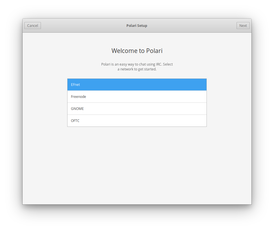 GNOMEのIRCクライアント、Polari。Welcome画面を表示している。